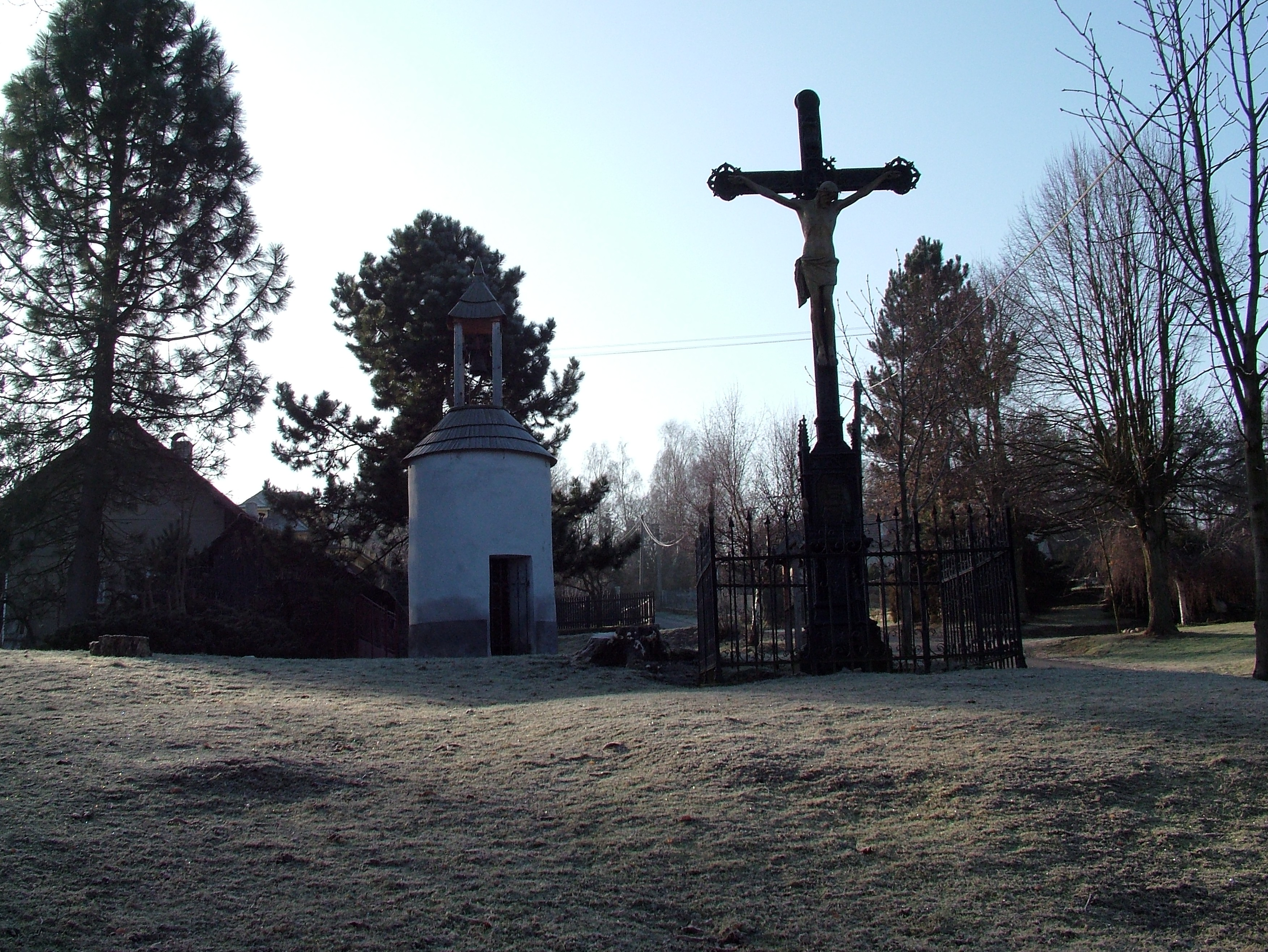 Autor fotografií: Vít Švajcr; Vít Švajcr´s photographs